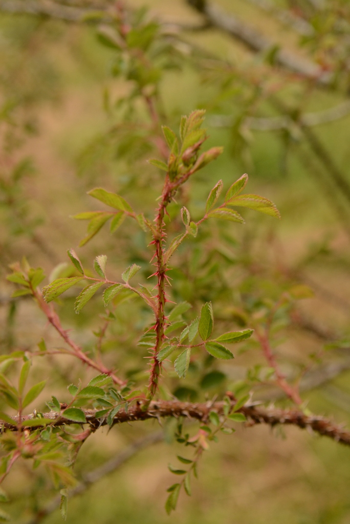 Photo d'un plant du rosier Rosa x aveyronensys